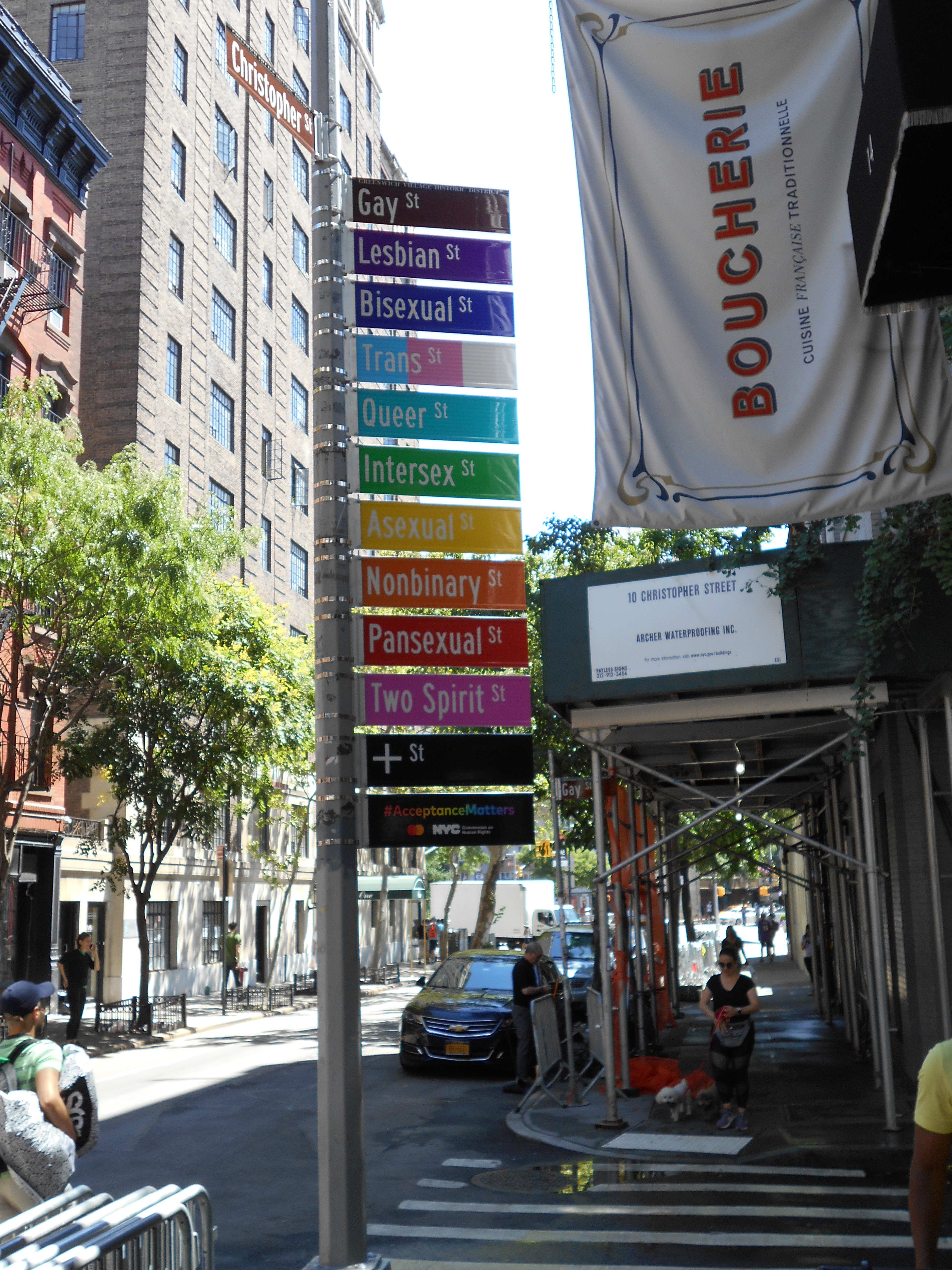 LGBTQ-Straßenschild in der Christopher Street, Greenwich Village, New York City